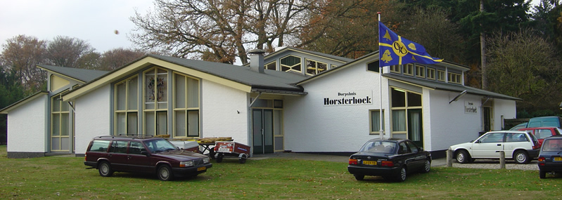 Zicht op een deel van het Dorpshuis Horsterhoek, Elspeterbosweg 26, 8076 RC Vierhouten. Gelegen in Vierhouten en gebouwd in 1953